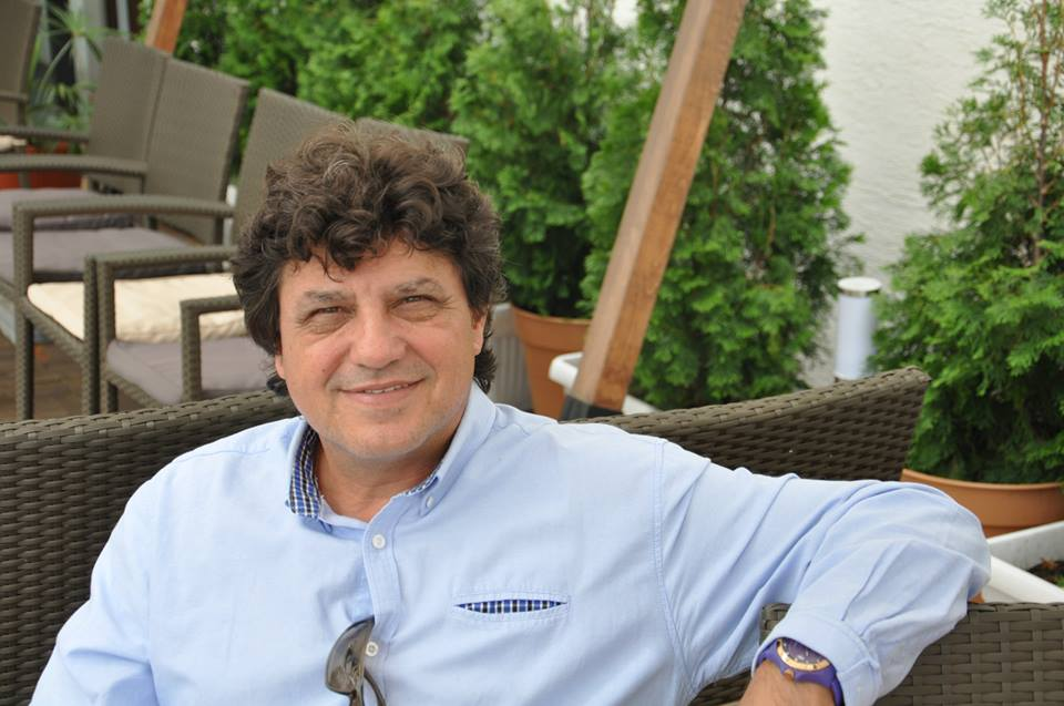 Ники Априлов